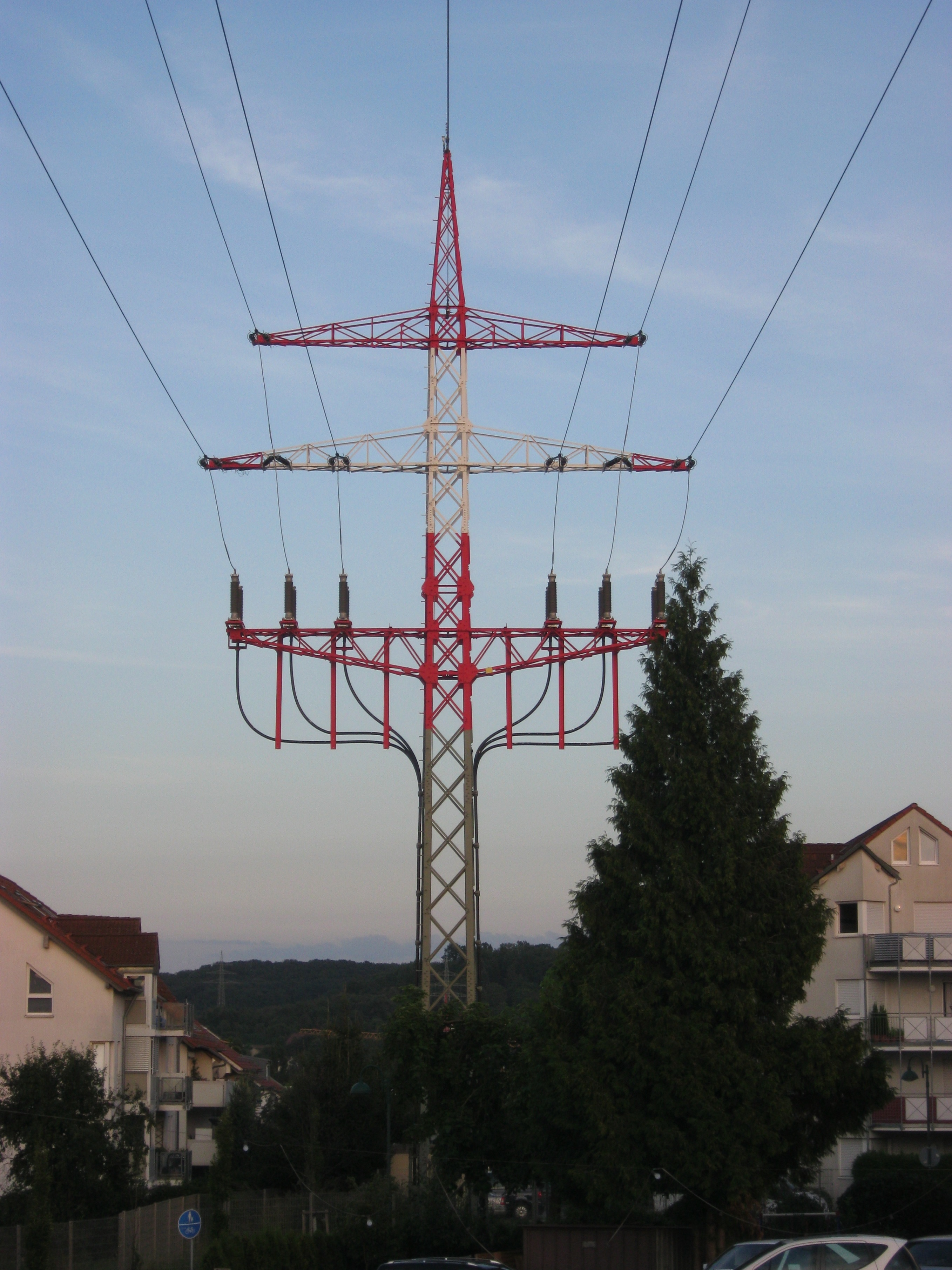 Endmast in Winnenden